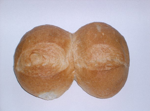 Doppeltes Brötchen (auch Doppelte); Semmel; hergestellt nach einem verkürzten Verfahren Fotograf: Sven Rost Copyright Status: GNU Freie Dokumentationslizenz